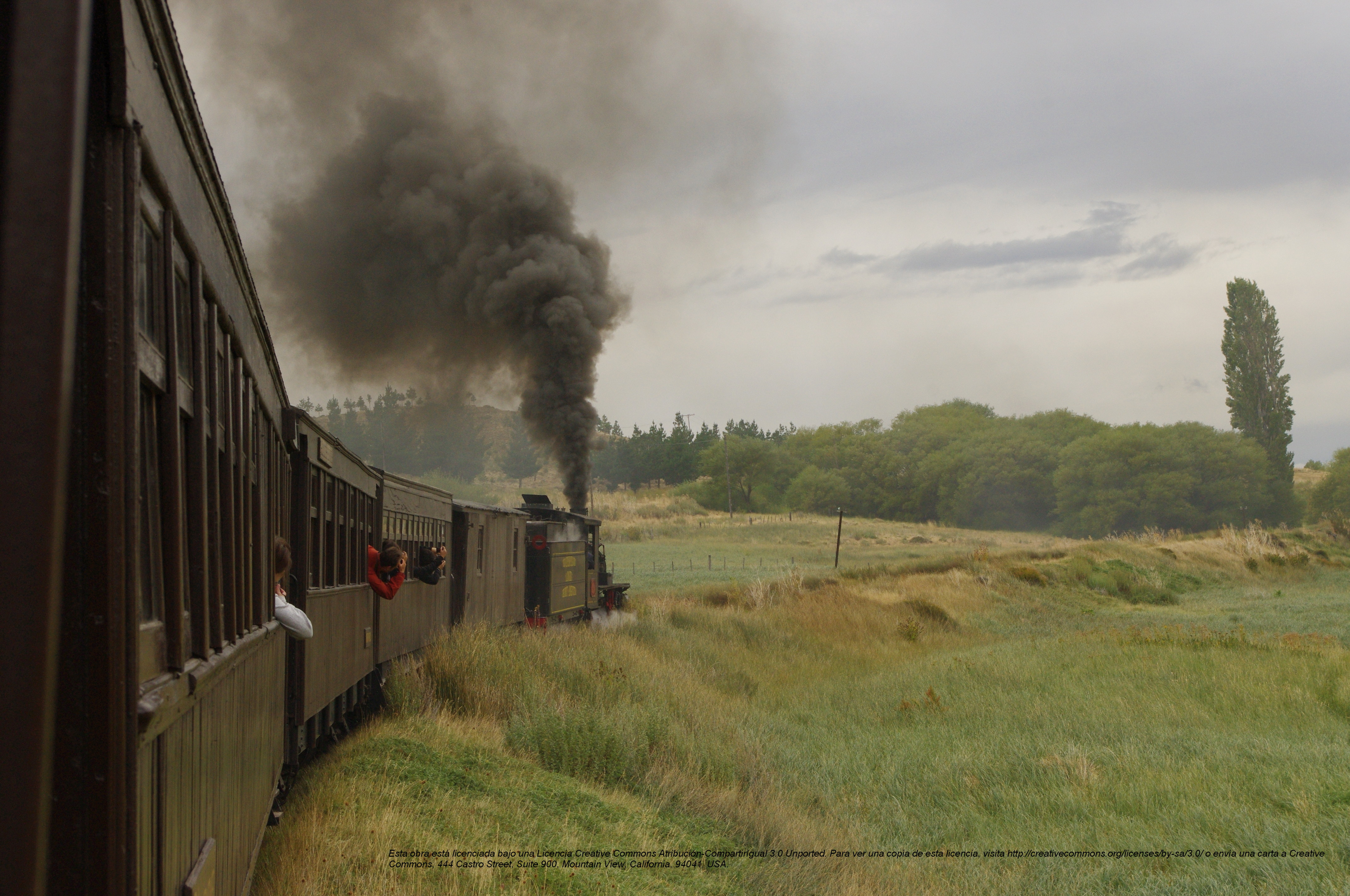 Ferrocarril La Trochita